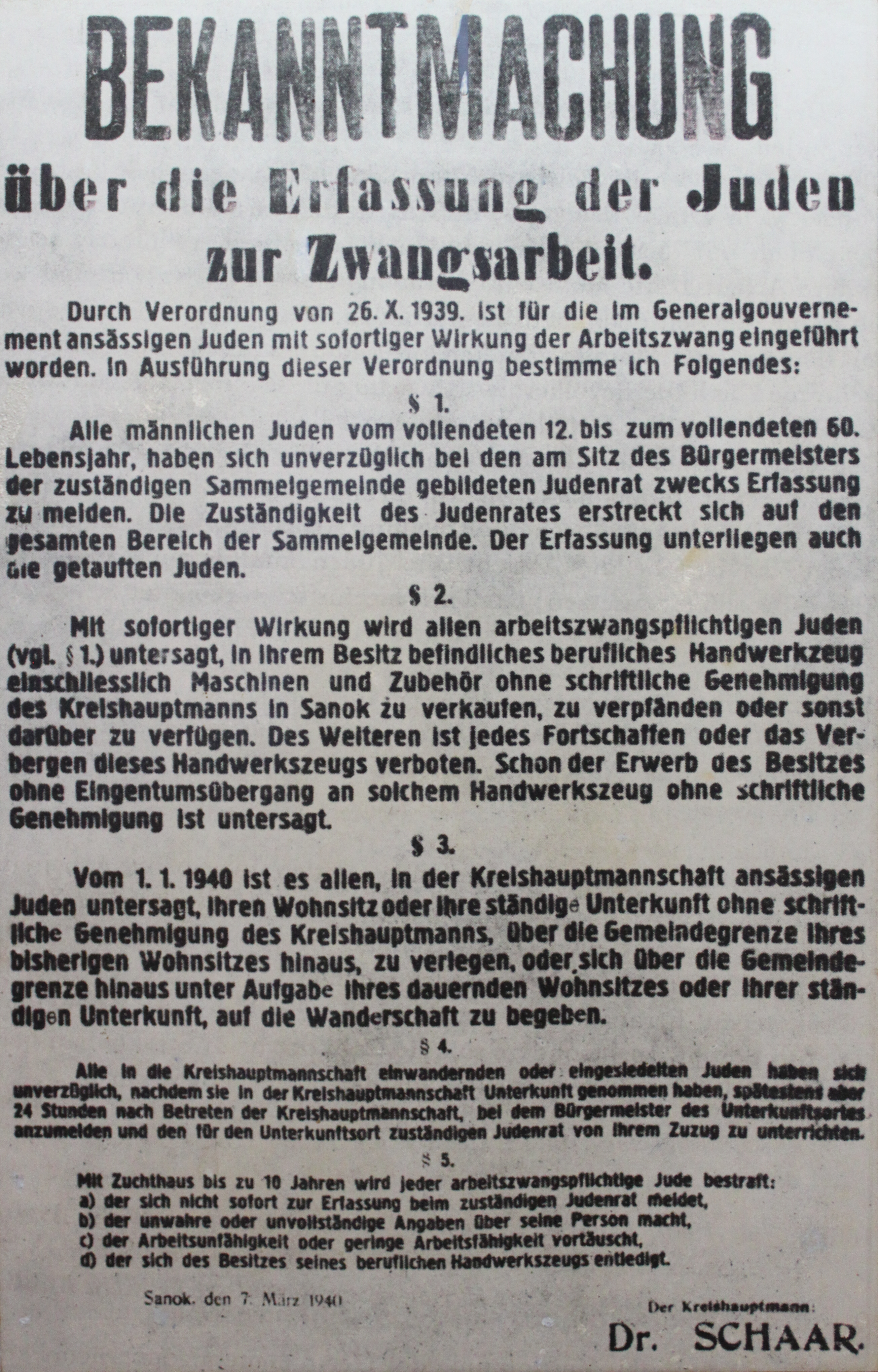 Bekanntmachung über die Erfassung der Juden zur Zwangsarbeit im Generalgouverement Polen, 7. März 1940. Ausstellung im Haus der Ghettokämpfer, Kibbuz Lochamej haGeta’ot, Israel.